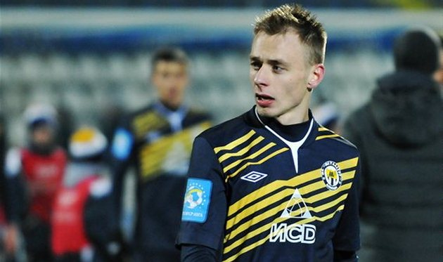 Сергей Болбат